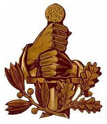 La force du Cabinda